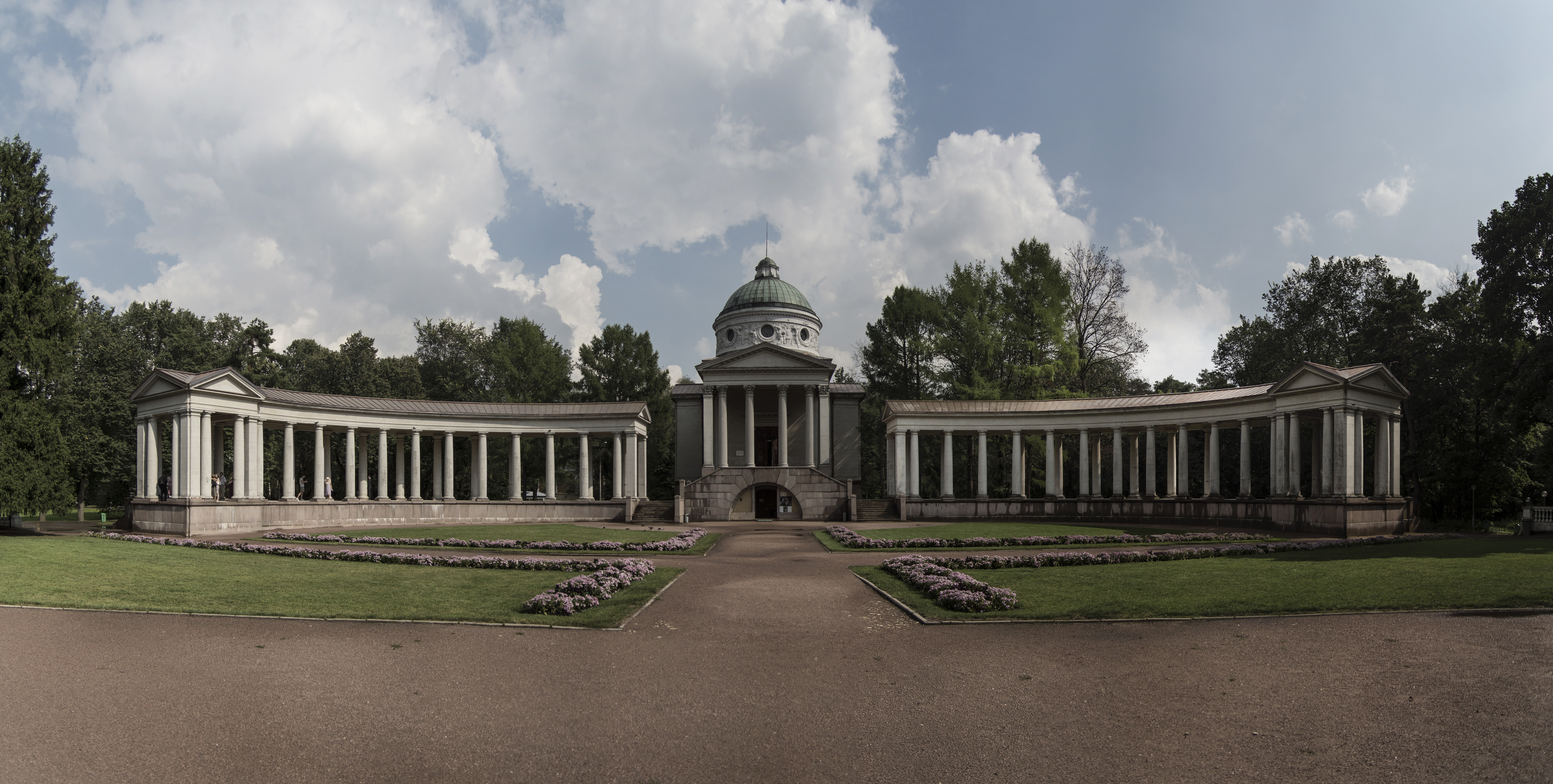 ХРАМ-УСЫПАЛЬНИЦА ЮСУПОВЫХ КОЛОННАДОЙ И БАЛЮСТРАДОЙ Комплекс памятников: МУЗЕЙ-УСАДЬБА "АРХАНГЕЛЬСКОЕ" (ГОЛИЦЫНА Н.А., ЮСУПОВА Н.Б.)